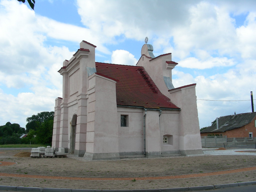 Беларуская (тарашкевіца): Гарадзкая Слуцкая брама. г. Нясьвіж This is a photo of Belarusian heritage monument. Reference number: 611Г000476 ( WLM)